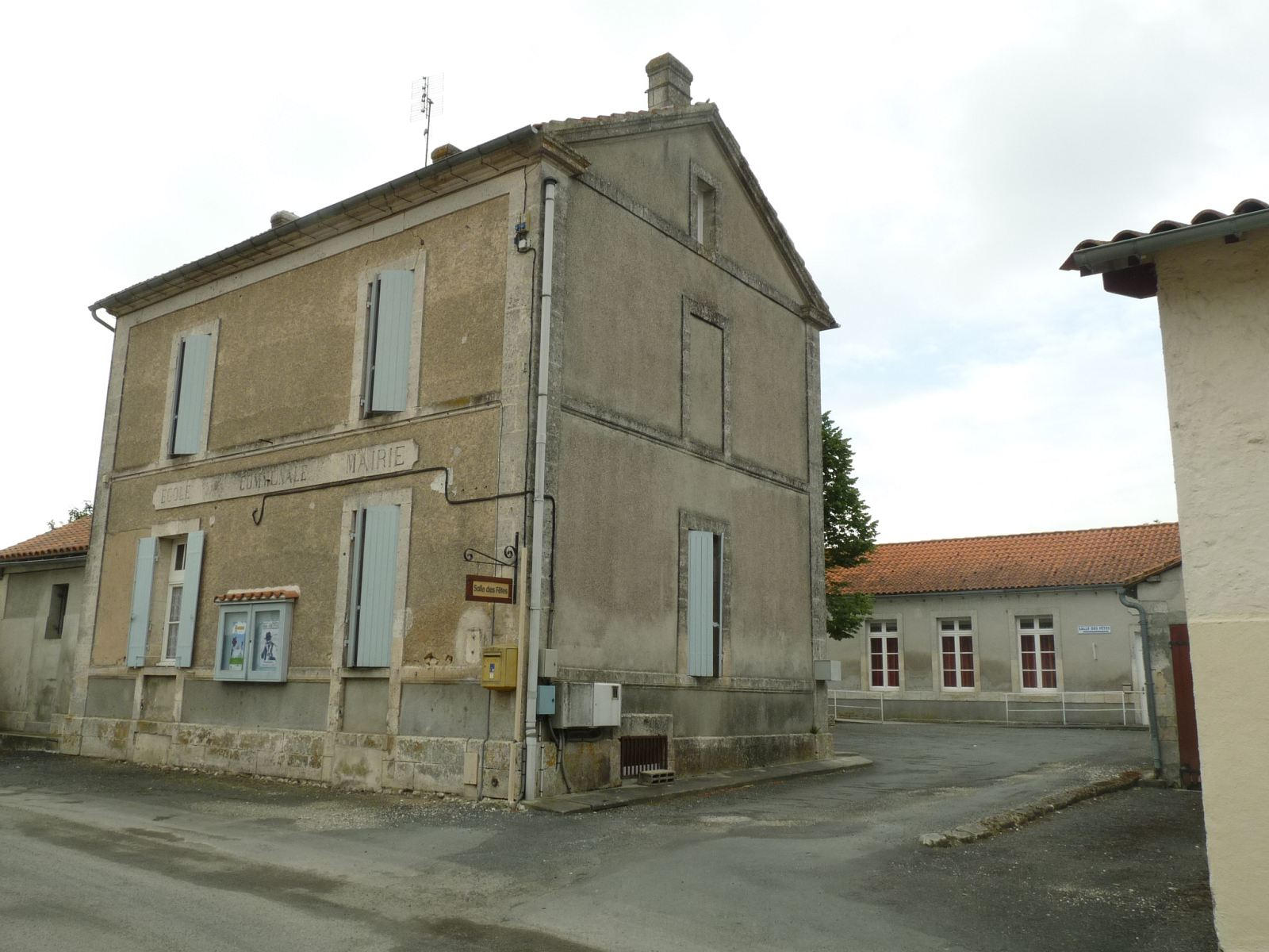 salle des fêtes de Poullignac, Charente, France; ancienne mairie-école